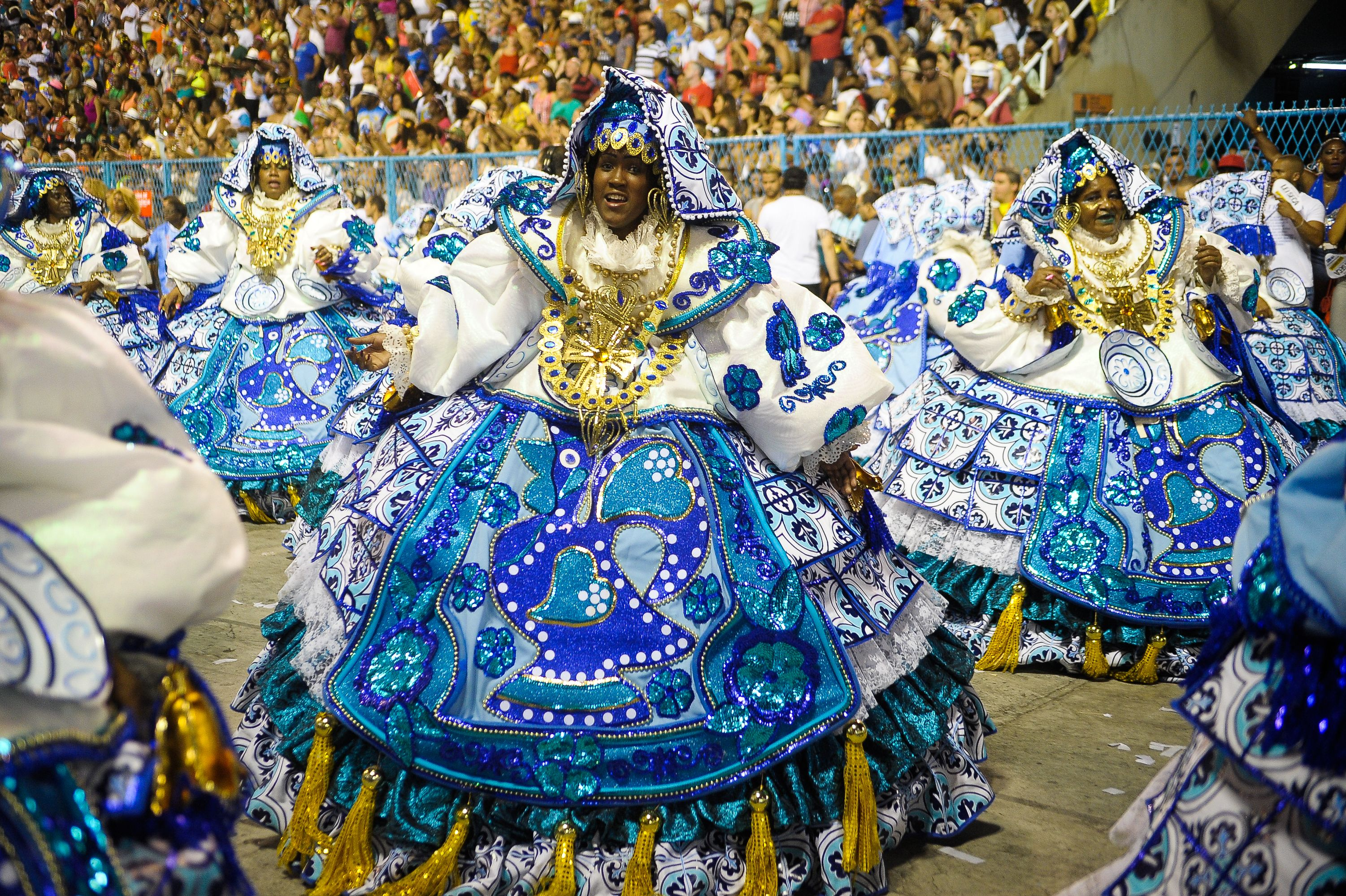 Rio de Janeiro - Acadêmicos do Grande Rio, a quarta escola do grupo especial do Carnaval do Rio,homenageia o Santos, com famosas e citações a Pelé e Neymar (Tomaz Silva/Agência Brasil)